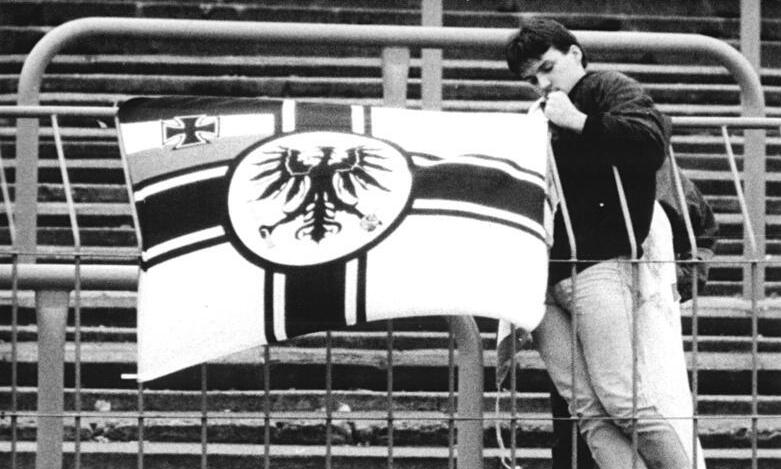 ADN-Mathias Hiekel-5.11.90 Dresden: Fußballspiel Dynamo Dresden - Hansa Rostock am 4.11.90 Die sogenannten Fans finden offensichtlich immer merkwürdigere Formen, um ihre Begeisterung für den Fußball zur Schau zu stellen. Diese Fahne z.B. dürfte wohl eher ein "Fall" für den Historiker sein. Die war aber kurz nach der Wiedervereinnigung noch öffentlich nicht verboten.